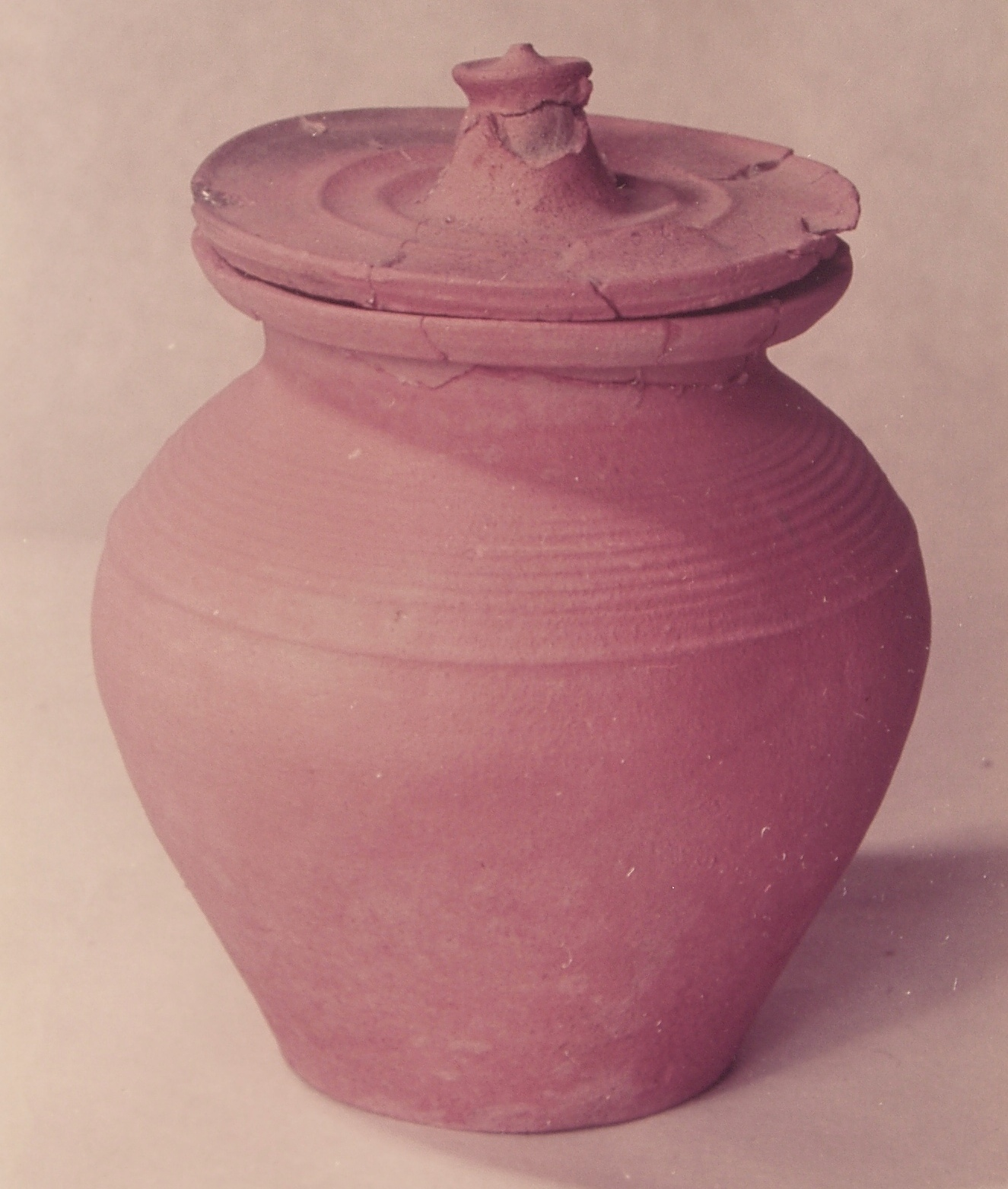 Münzgefäß der Kirche in Wittelbach. Maße: Höhe ohne Deckel: 18,5 cm; maximaler Durchmesser am Bauch 17,5 cm.